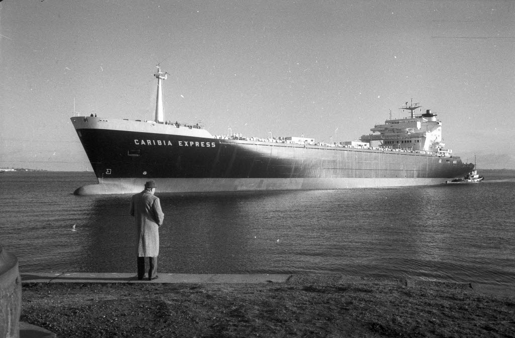 Jungfernfahrt. Einfahrt in den Nord-Ostsee-Kanal durch die Holtenauer Schleuse mit Schlepperhilfe durch BUGSIER 16 (rechts).